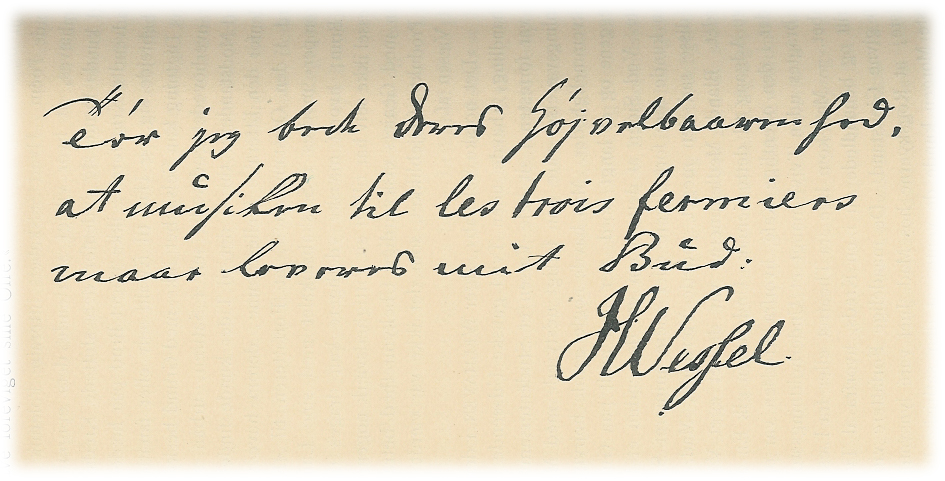 Johan Herman Wessels håndskrift. En billet til teatrets direktør kammerherre Warnstedt angående Wessels oversættelse af Monvels tekst til to-akts syngestykket "De tre Forpagtere" opført første gang den 30. oktober 1780.